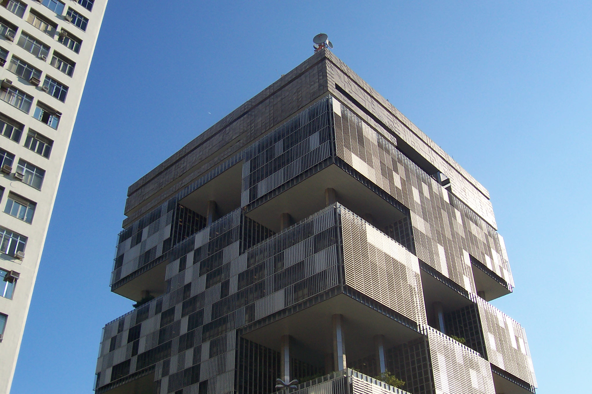 Petrobras' Building in Rio de Janeiro.